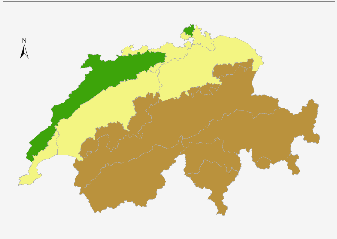 Trois régions biogéographiques suisses selon le site de l'OFEV